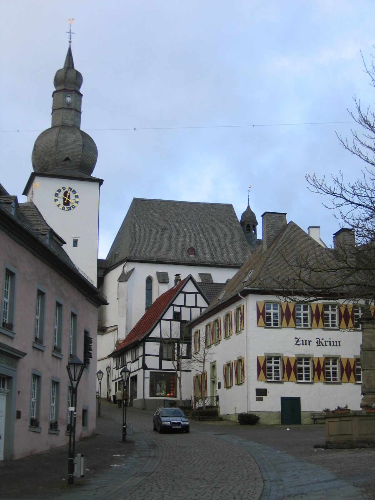 "„Alter Markt“ mit Rathaus (1710), Glockenturm (1723), Stadtkapelle St. Georg (1323) und Haus „Zur Krim“ in Arnsberg.